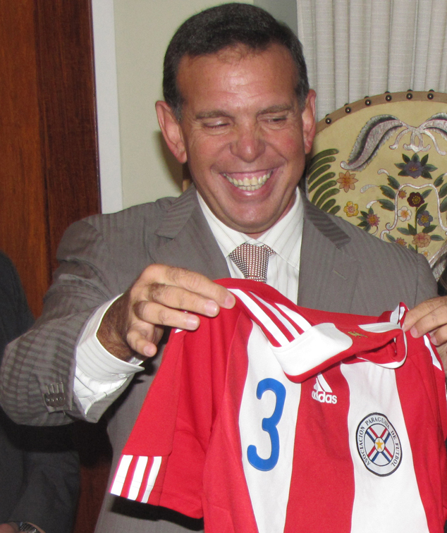 Juan Ángel Napout, 21 September 2010.